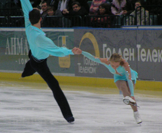 Tatiana Totmianina und Maxim Marinin während der Russischen Meisterschaften 2005